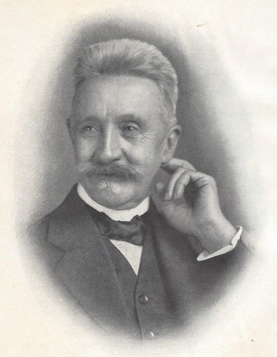 Porträtfotografie des Hamburger Chirurgen August Wiesinger (1850–1922)